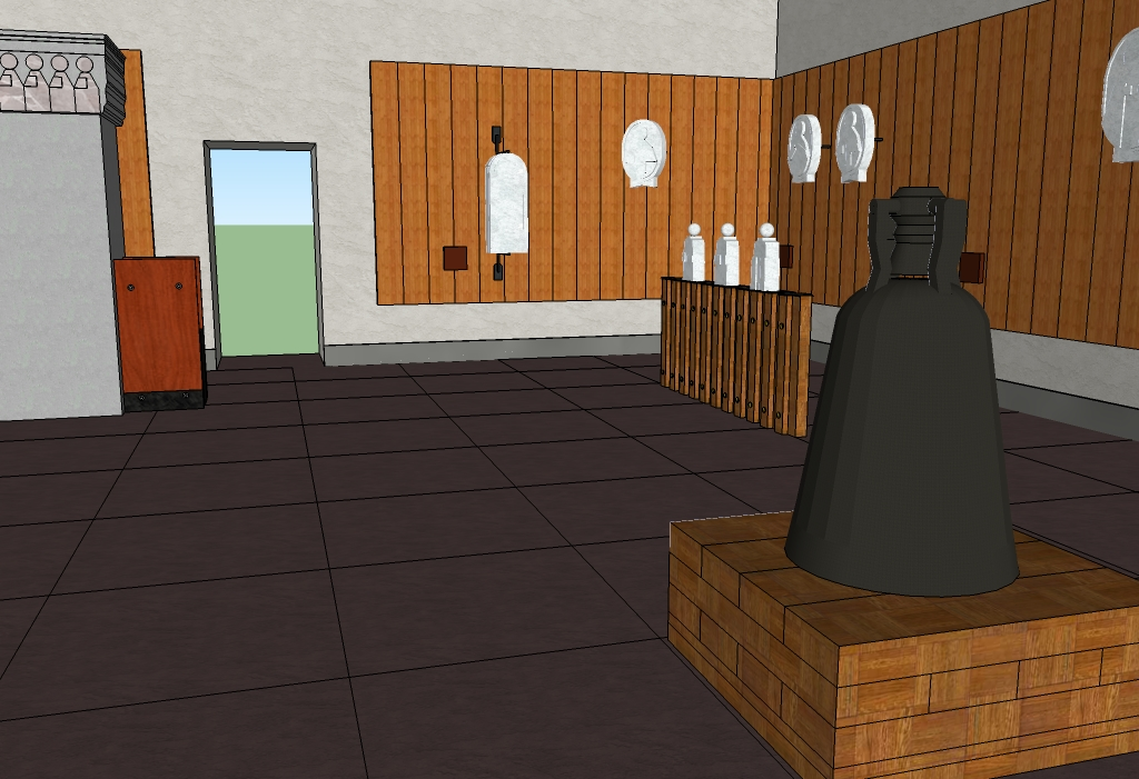 Scorcio sala VI 3D